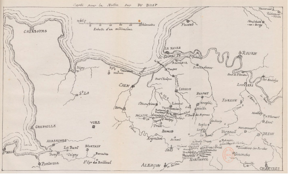 Cartes branches normandes - Famille du Buat. Réalisé par Pierre Louis George du Buat ou Adhémar Barré de Saint-Venant. Source : Adhémar Barré de Saint-Venant, Notice sur la vie et les ouvrages de Pierre-Louis-Georges, comte Du Buat, colonel du génie... auteur des "Principes d'hydraulique", 1866. Lien